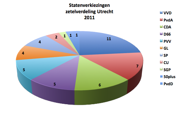 Uitslag provinciale statenverkiezingen Utrecht vertaald in zetels